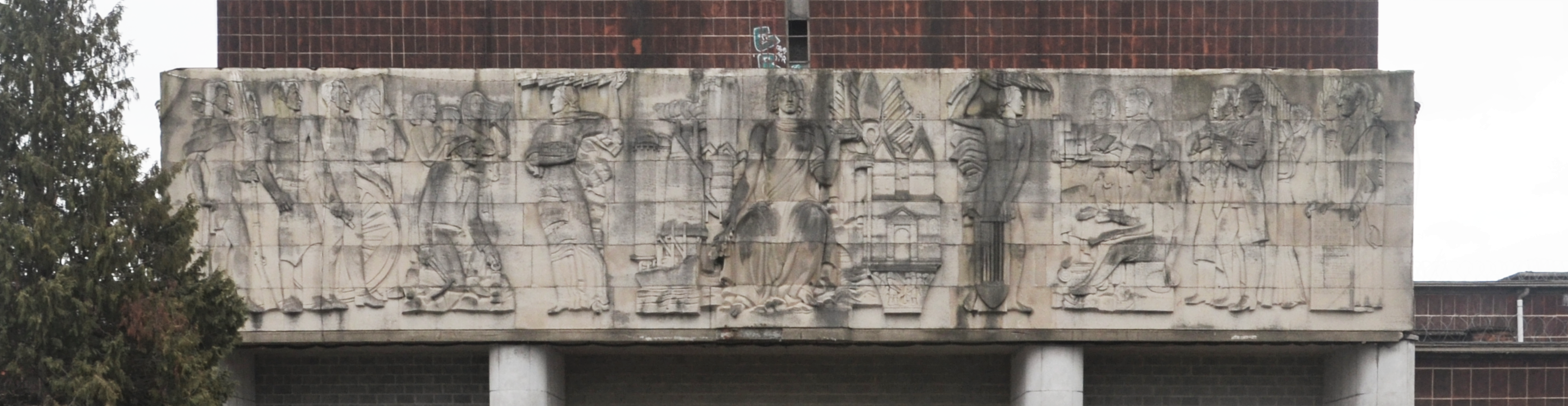 bas-relief d'Aldolphe Wansart "Liège, l'art et l'industrie"